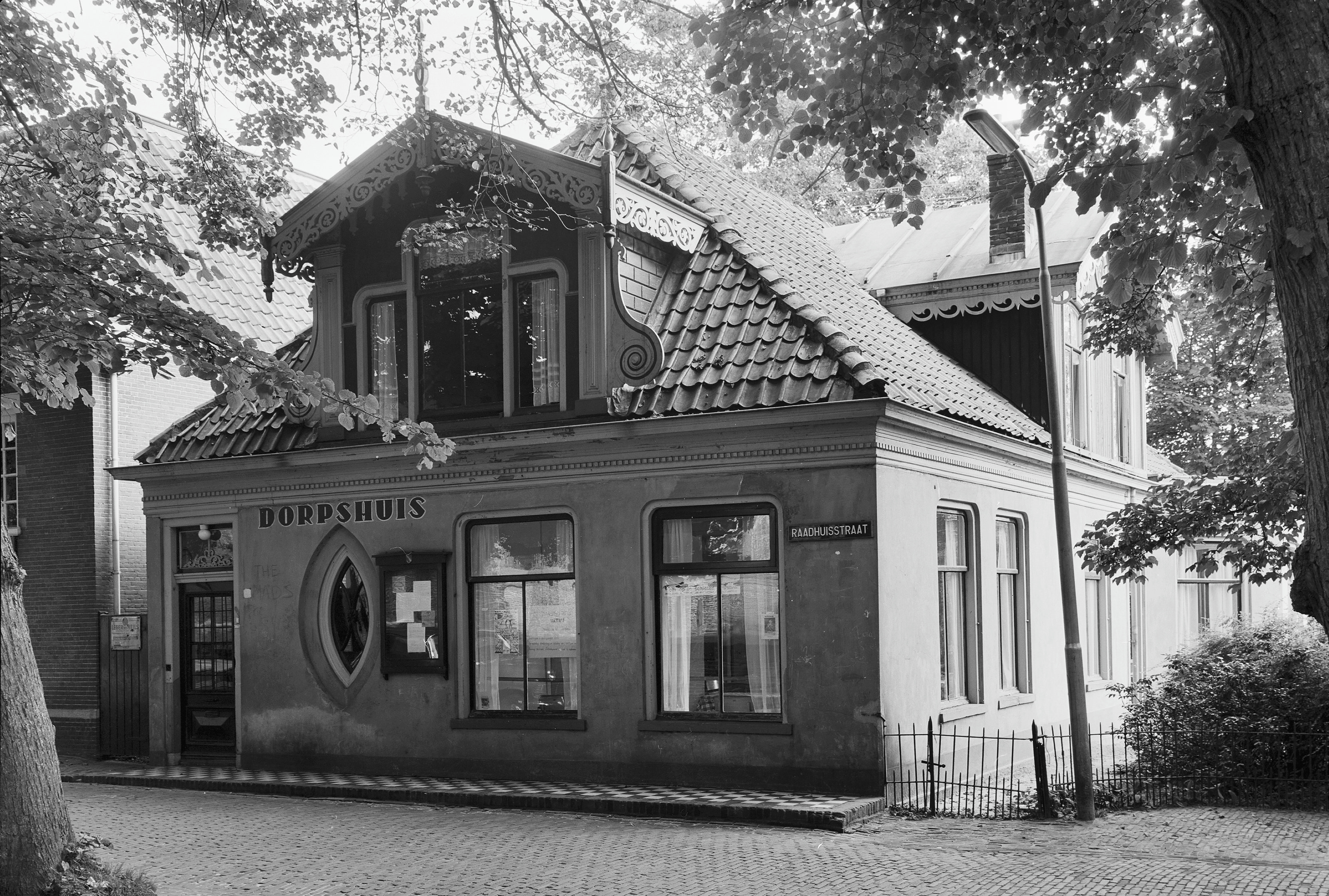 Dorpshuis voor-en zijgevel